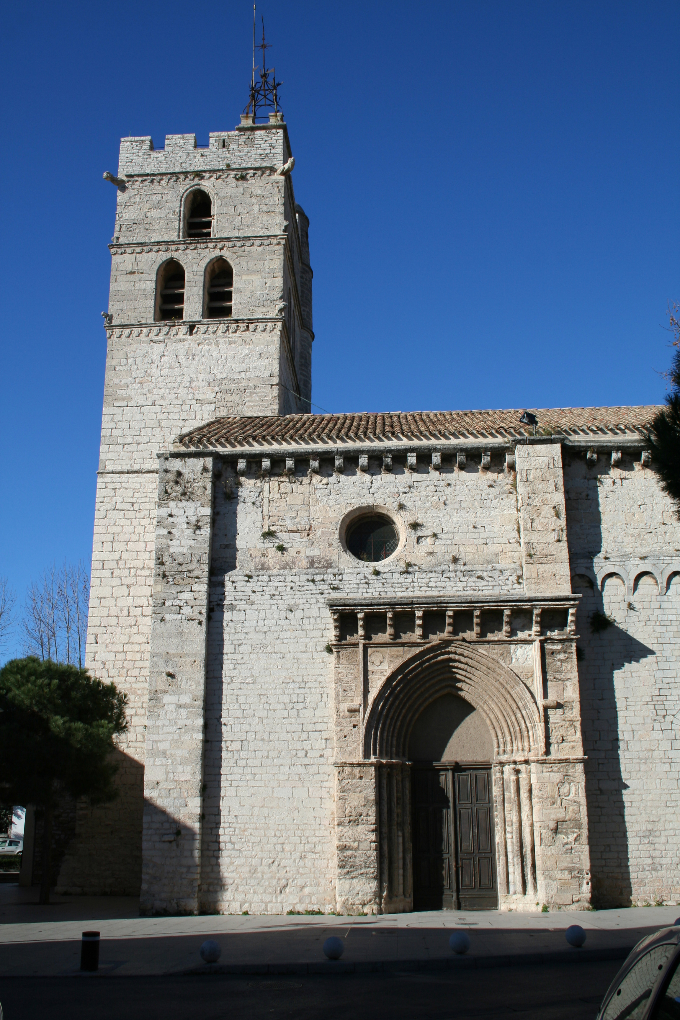 Frontignan (Hérault) - Église Saint-Paul - Portail et clocher.